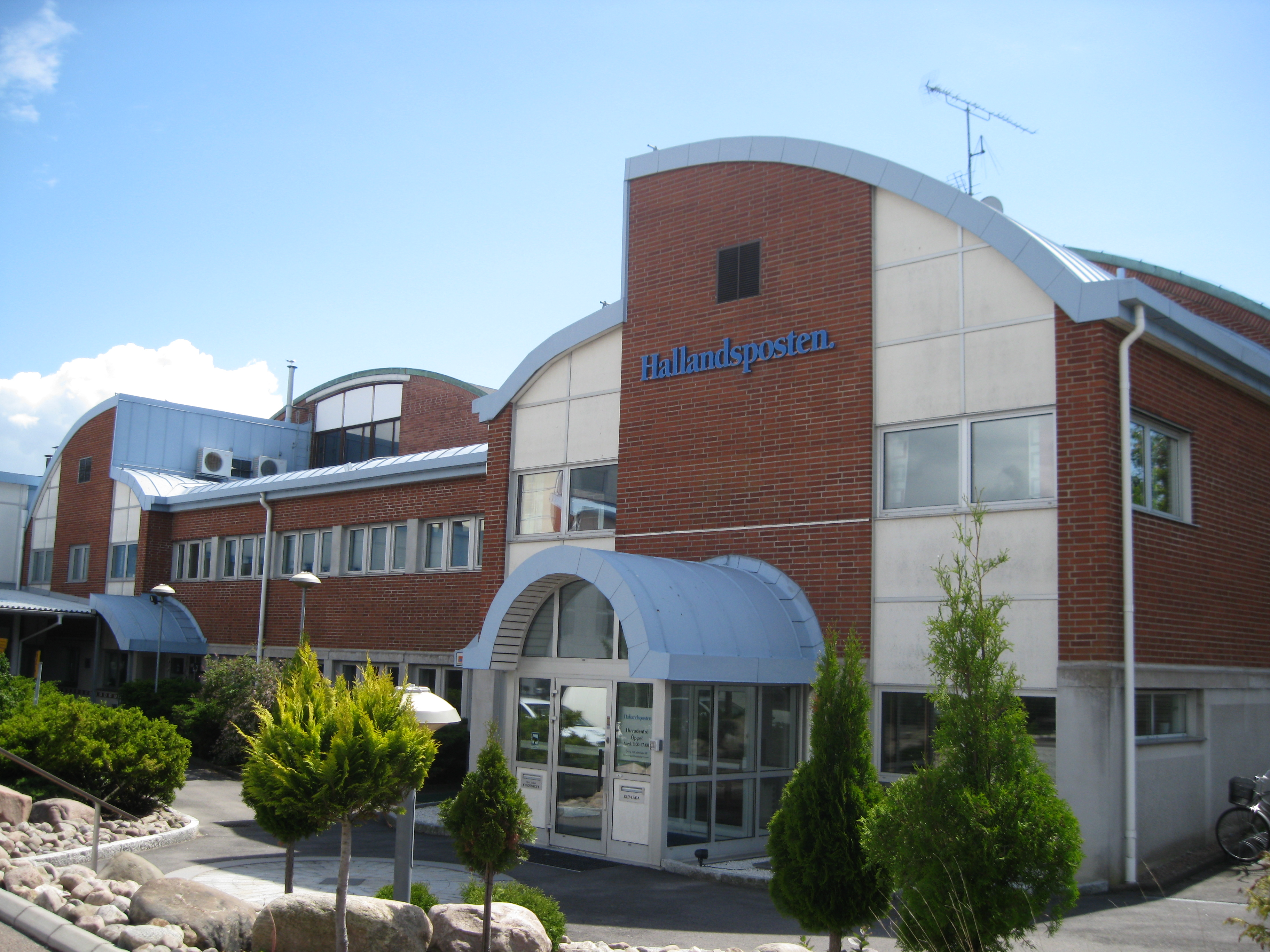 Hallandspostens lokaler på Söder i Halmstad.